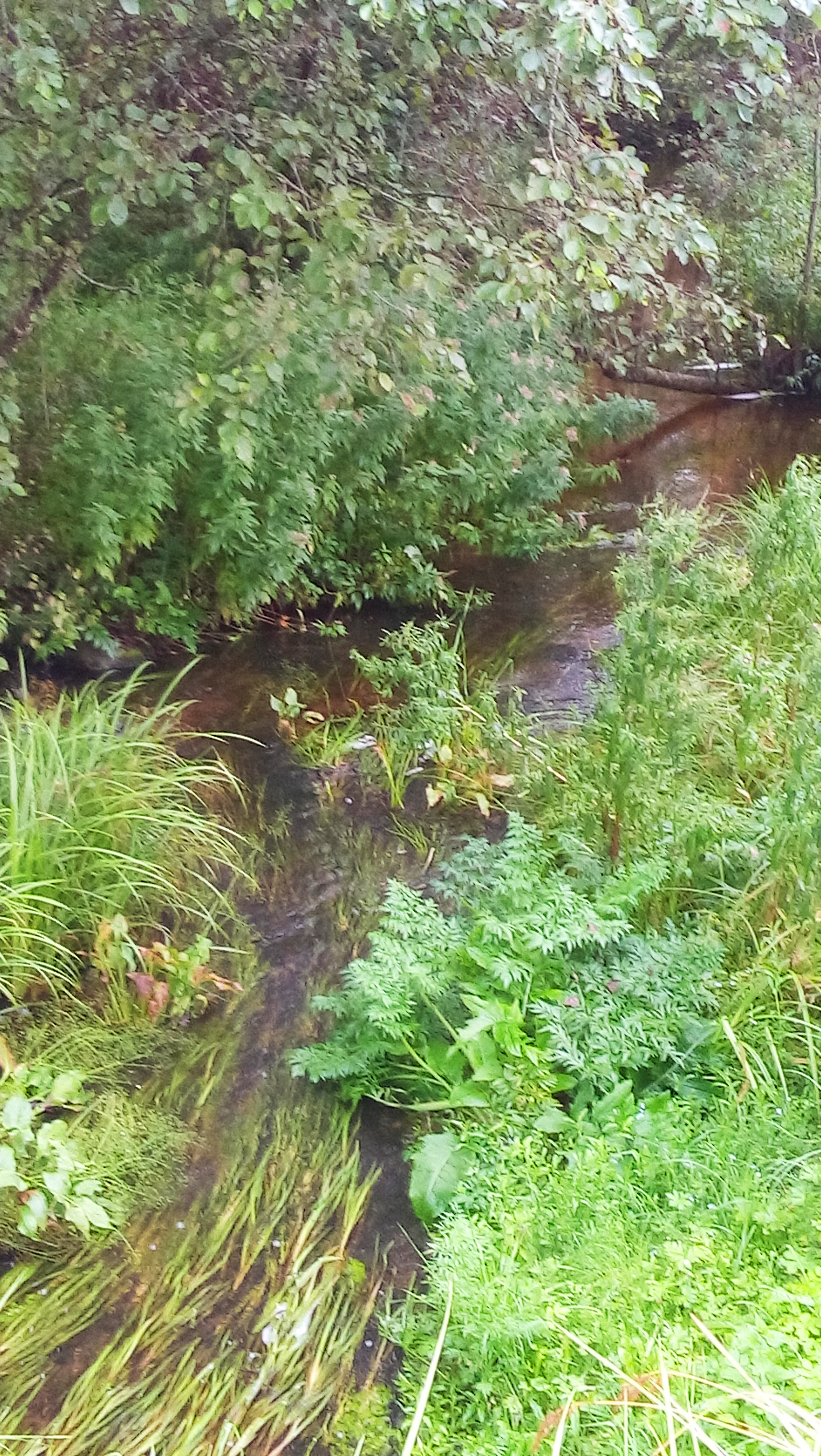 Река Луговка